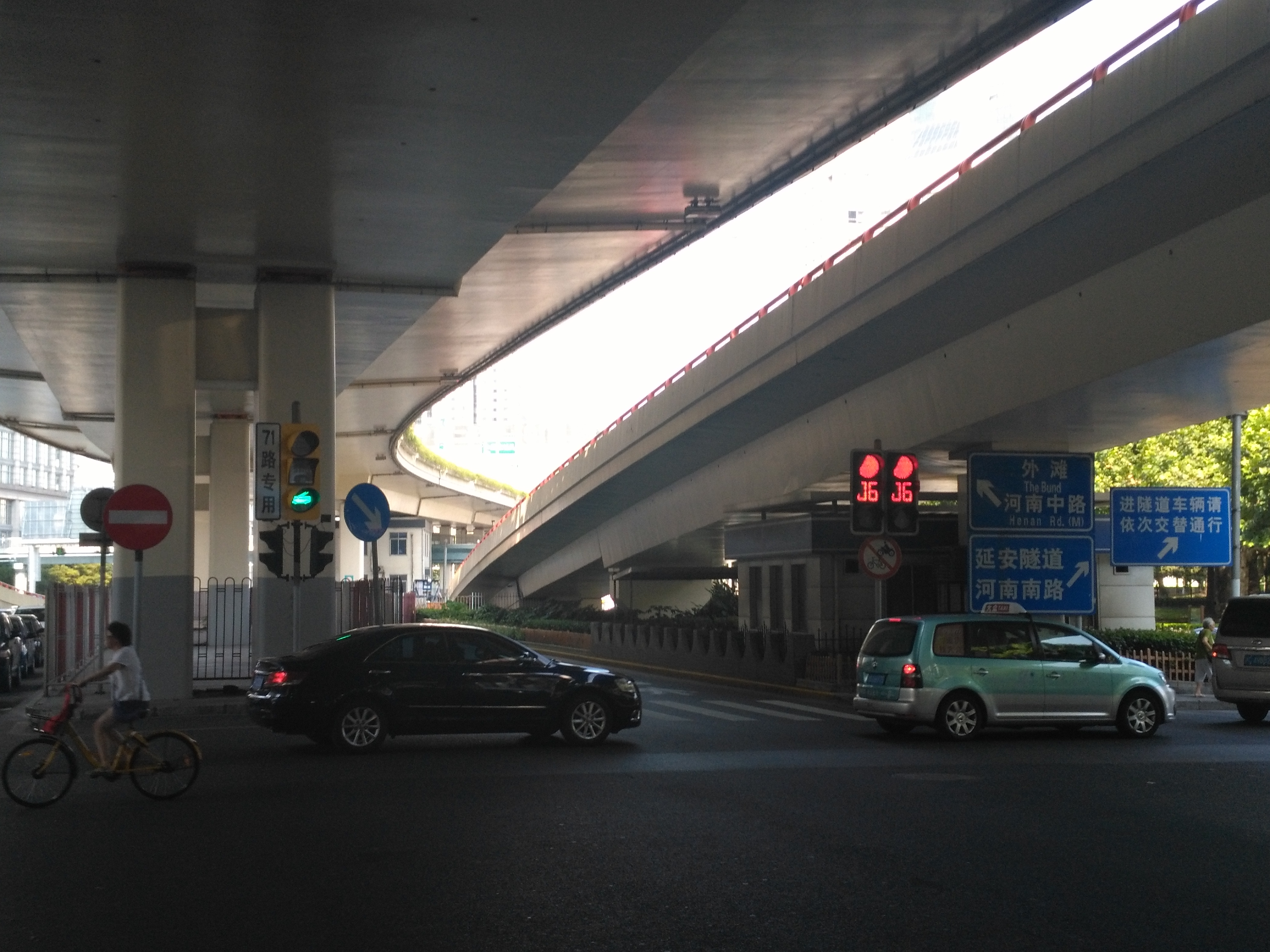 中文（中国大陆）: 延安路中运量系统工程信号优先范例——浙江路口